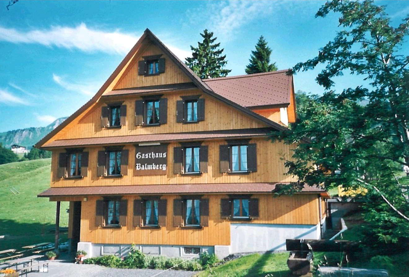 Gasthaus Balmberg auf dem Stoos im Kanton Schwyz in der Schweiz